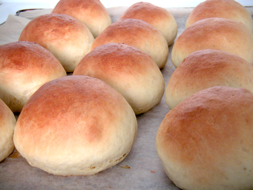 Boller